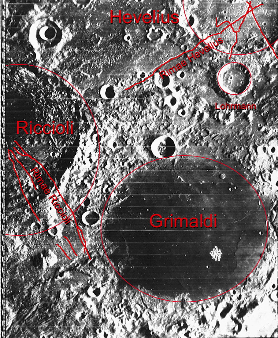 罗尔曼陨石坑的周边照片